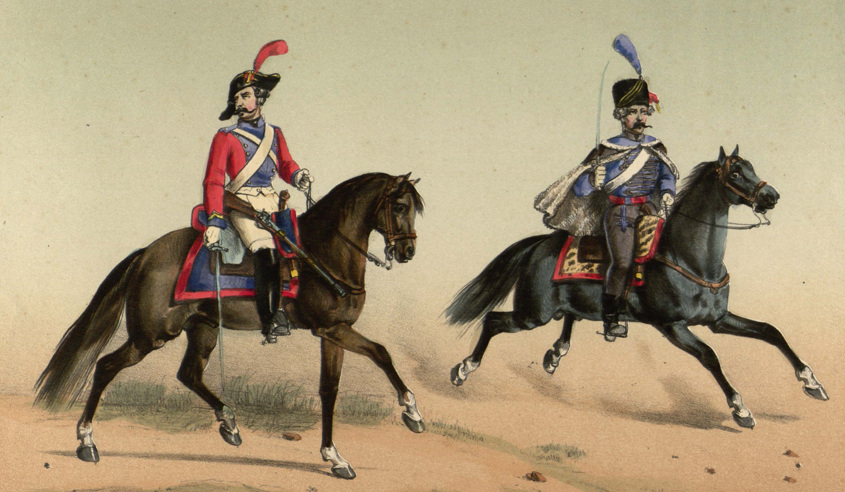 Carabinero del Regimiento de Maria Luisa y dragon del Regimiento de Húsares Españoles (1795)